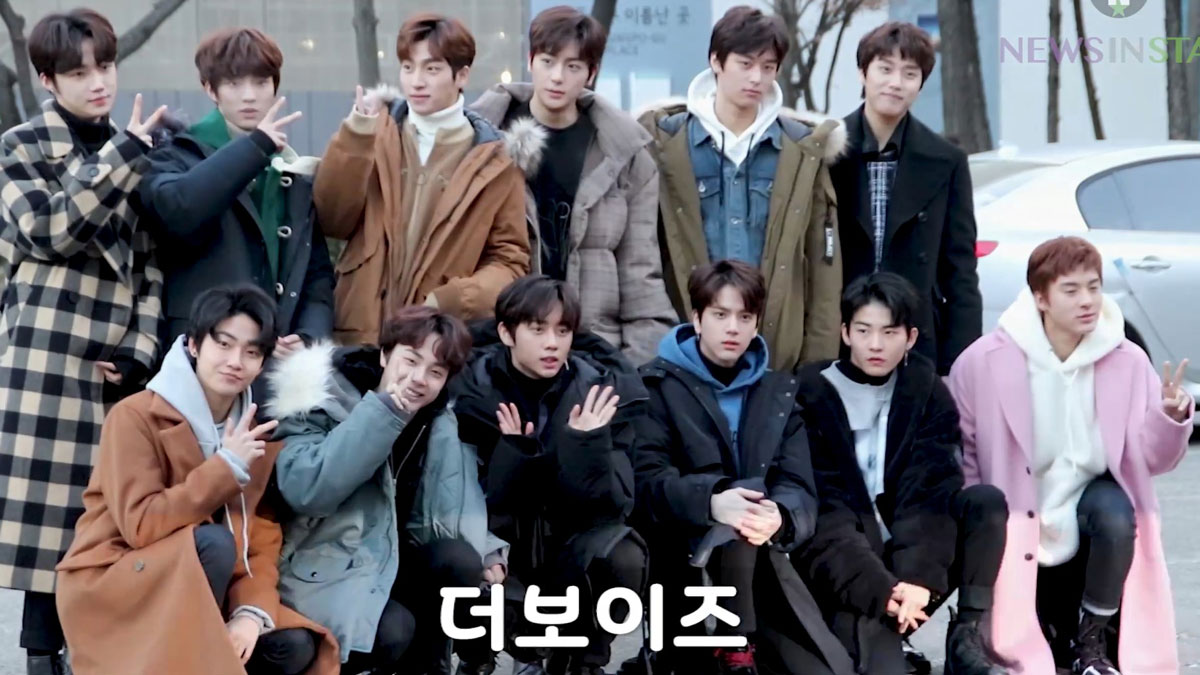 180112 KBS 뮤직뱅크 출근길